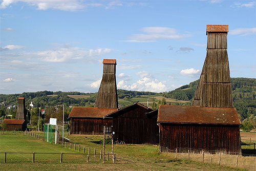 Zurzach: Salzbohrtürme (Salinen) aus dem Jahr 1916